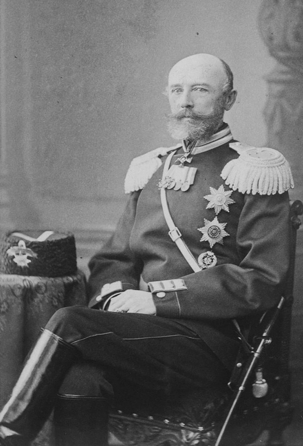 Россия. Столыпин Аркадий Дмитриевич (1820-1899), генерал-майор свиты, отец министра Столыпина Петра А. Примерно 1879-1882гг.